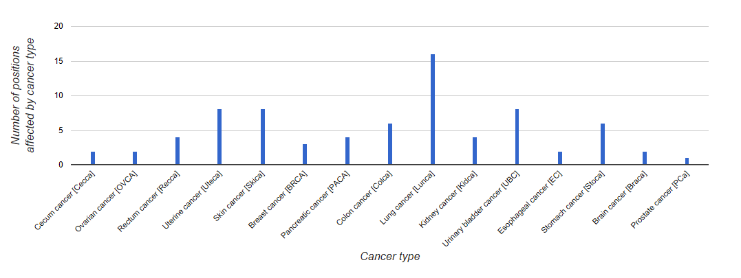 Gràfico sobre los tipos de cancer que provoca una mutación en la Rab3B